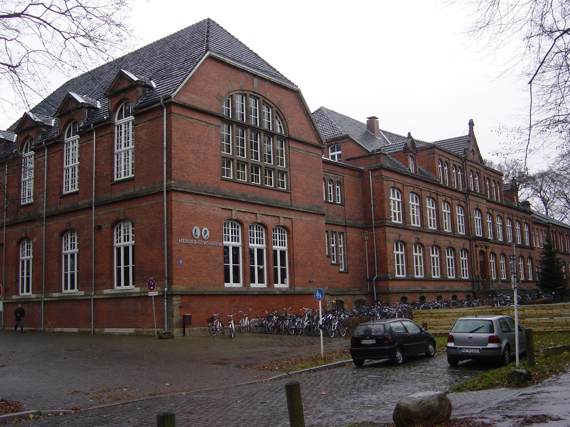 Herder-Gymnasium, Brüningstr. 2, 32427 Minden